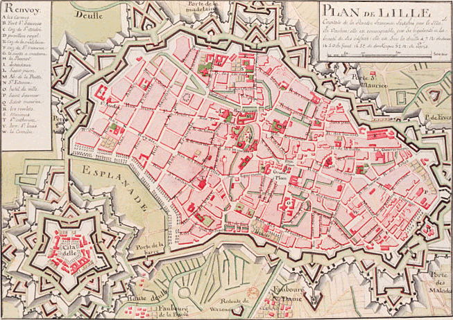 Carte du vieux Lille et de la citadelle Vauban (publication du XVIIIe siècle) Origine de l'image : Gallica (Notice n° : FRBNF38646965)